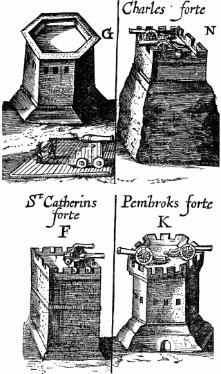 Various 1614 Bermuda Forts